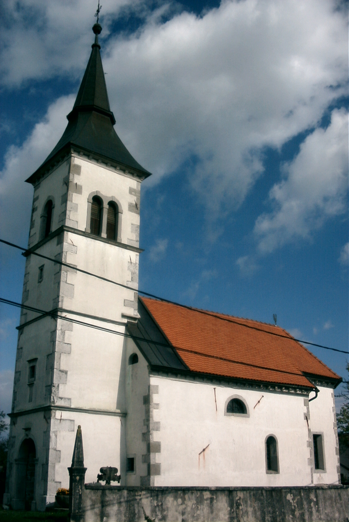 Slovenska vas - cerkev